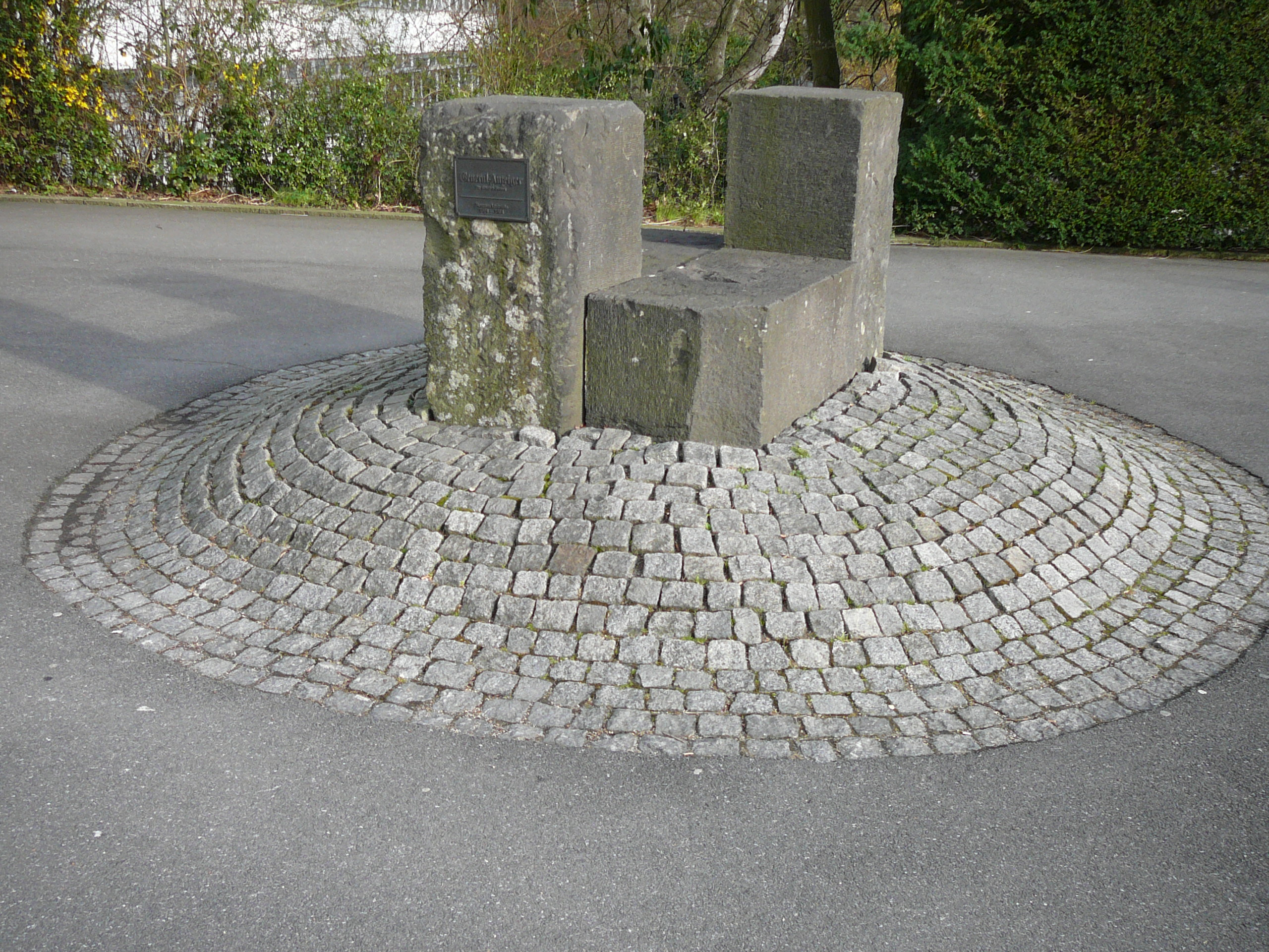 Otto-Hausmann Ring, Wuppertal